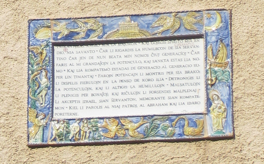 Kirko de la vizito en Ejn Kerem, Jerusalemo - preĝo Magnificat